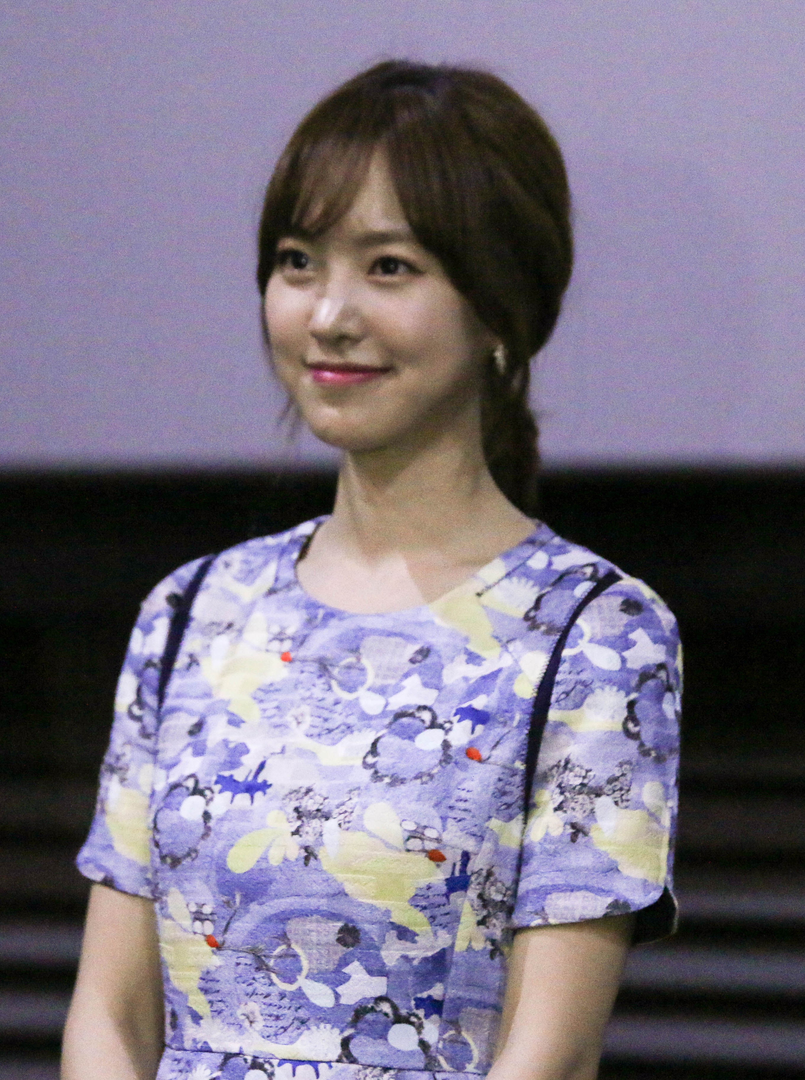 150505 진세연 CGV중계 위험한상견례2 무대인사